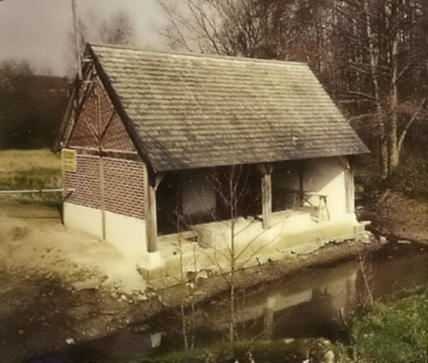 Lavoir